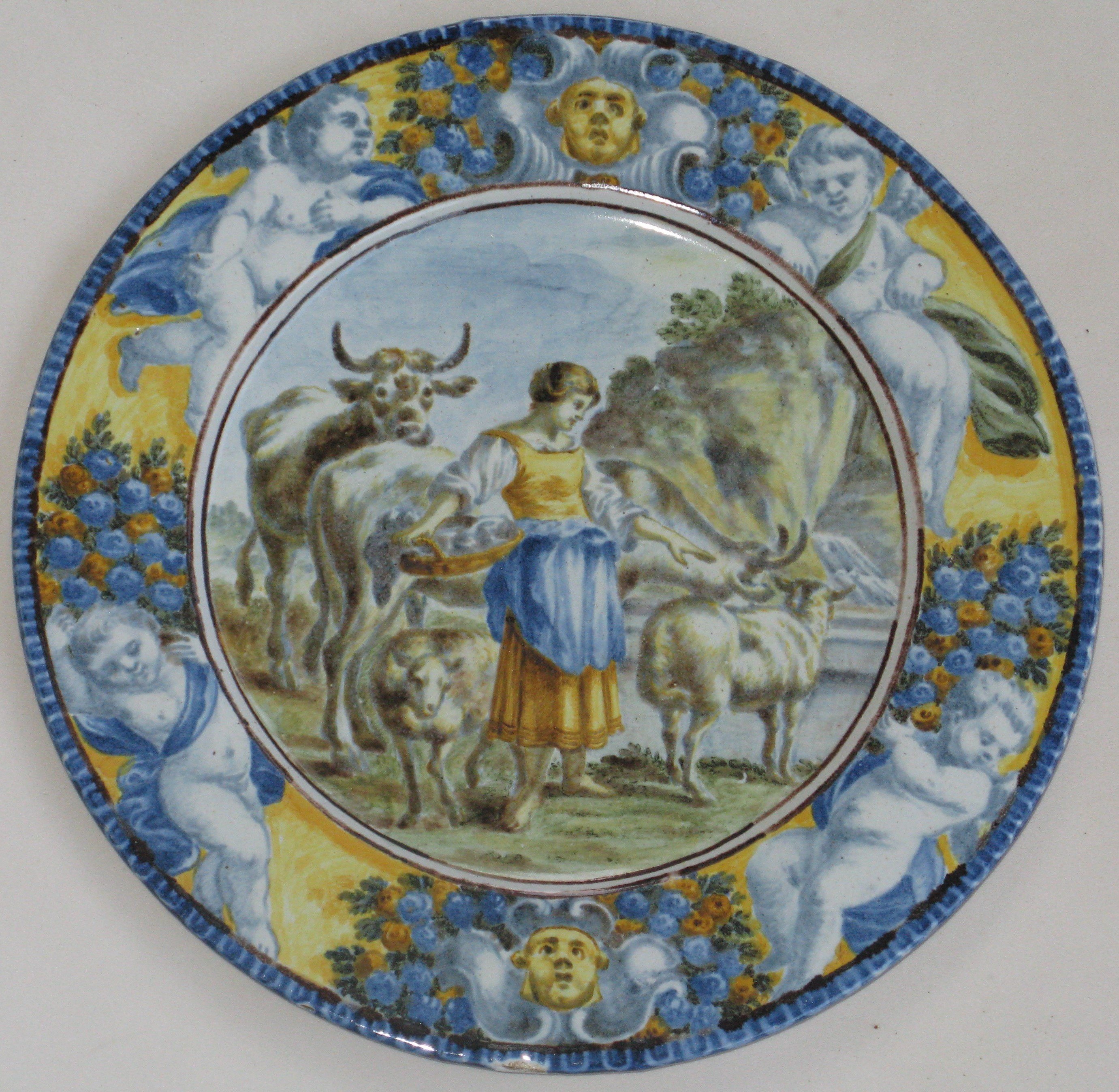 Aurelio Grue, Scena pastorale, 1740 ca., 2015